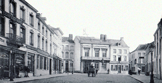 Ancien Hôtel de ville de Soignies